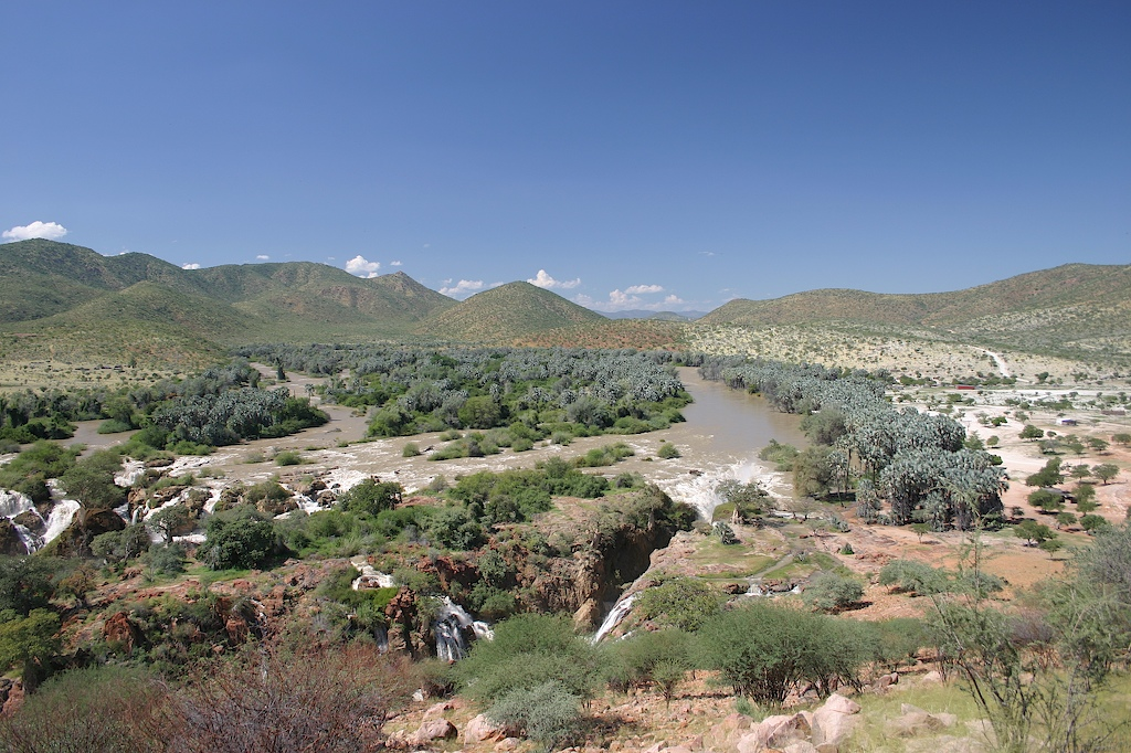 Epupa Falls